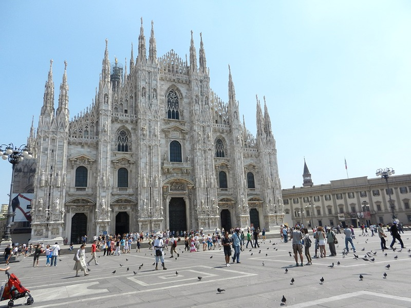 Milano - Duomo